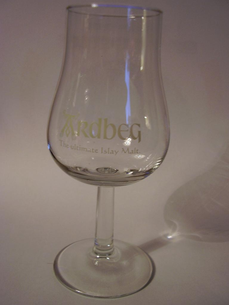 Whiskyprovarglas